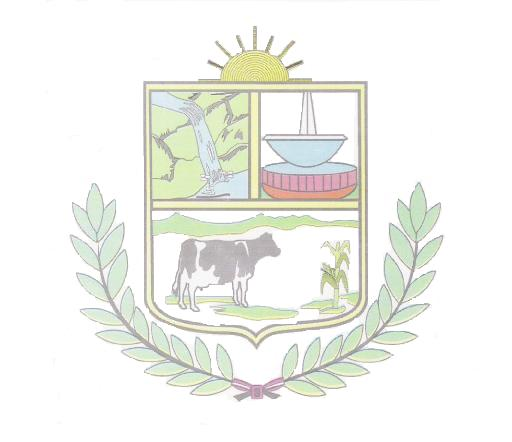 Escudo del Distrito de Agua Blanca